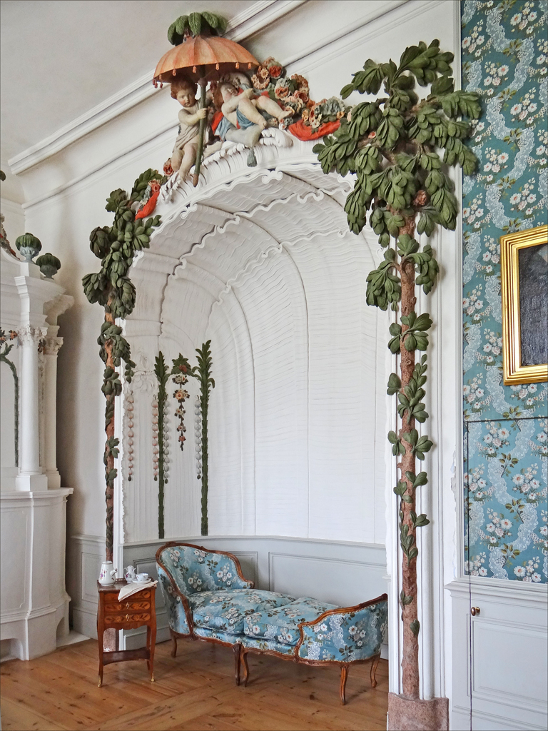 Alcôve dans le boudoir de la Duchesse de Courlande, décorée de stucs polychromes par JM Graff ___________ Le palais de Rundale est l'un des monuments les plus remarquables de l'art baroque et rococo en Lettonie. Il a été construit entre 1736 et 1740 comme résidence d'été du duc de Courlande : Ernst Johann von Biron (1690-1772), favori de l'impératrice de Russie Anna Ioannovna (1693-1740). L'architecte italien Francesco Bartolomeo Rastrelli (1700-1771) a conçu le Palais de Rundale et en a supervisé les travaux de construction. Il est l'architecte de nombreux bâtiments officiels de Saint Pétersbourg. Après la mort de l'impératrice Anna Ioannovna, le duc a été arrêté et envoyé en exil en Sibérie. Les travaux de construction du palais ont repris après le retour du duc en 1763 au début du règne de l'impératrice Catherine II. La majeure partie de l'intérieur du palais a été créée entre 1765 et 1768. Les maîtres italiens de Saint-Pétersbourg : Martini Francesco et Carlo Zucchi sont les auteurs des peintures sur les plafonds et les murs tandis que le sculpteur Johann Michael Graff de Berlin a fait les décorations en stuc sur fond de marbre artificiel. Article de Wikipedia sur Biron Article de Wikipedia sur le palais Site du palais de Rundale (en)